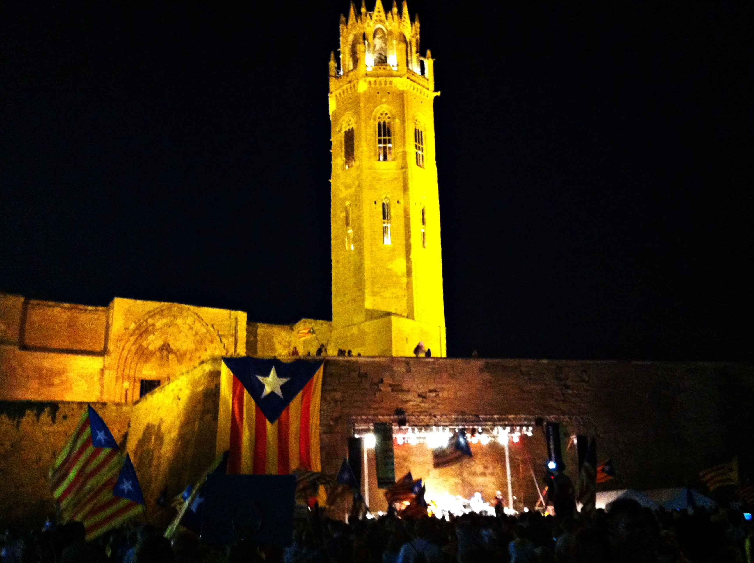 Final de l'acte d'inici de la Marxa per a la Independència de Catalunya que es va iniciar a Lleida el juny de 2012 i que va cloure a la Manifestació "Catalunya, nou estat d'Europa"